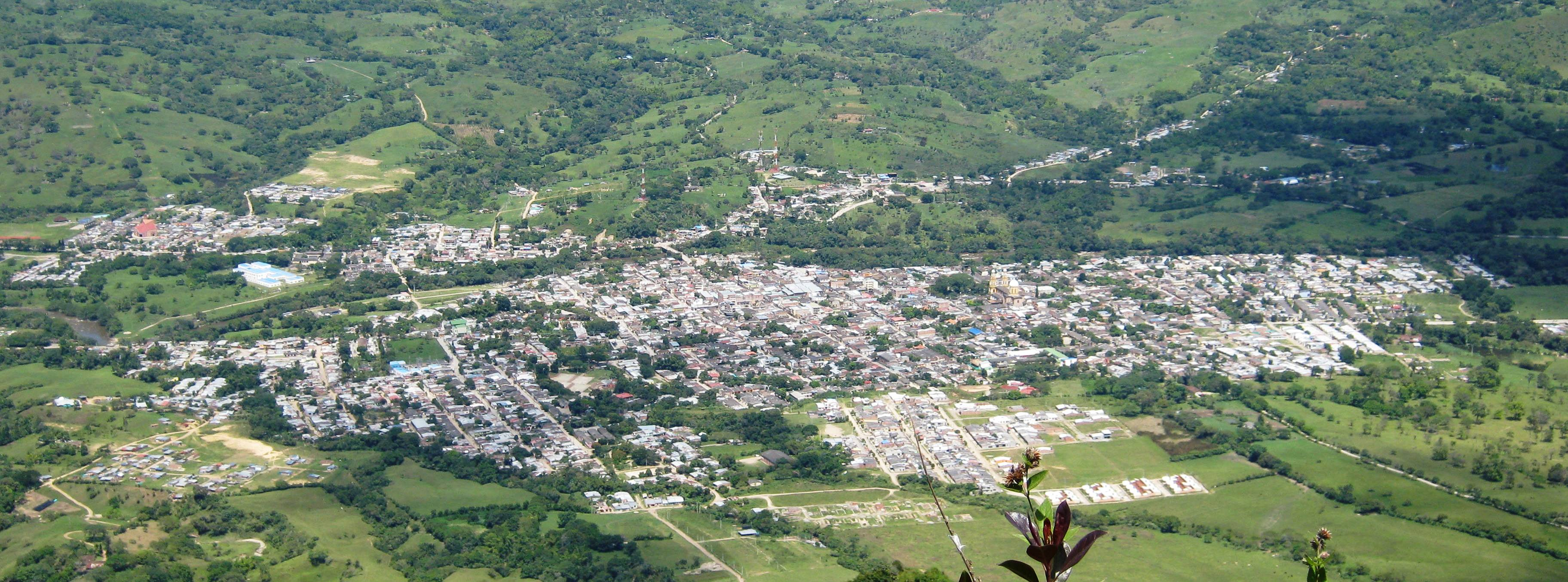 Panorámica de la plata huila vista desde la vereda la esperanza